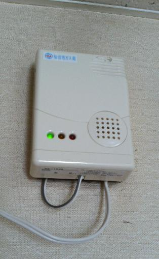 新コスモス電機製 複合型ガス警報器（都市ガス+一酸化炭素）XZ-193G型